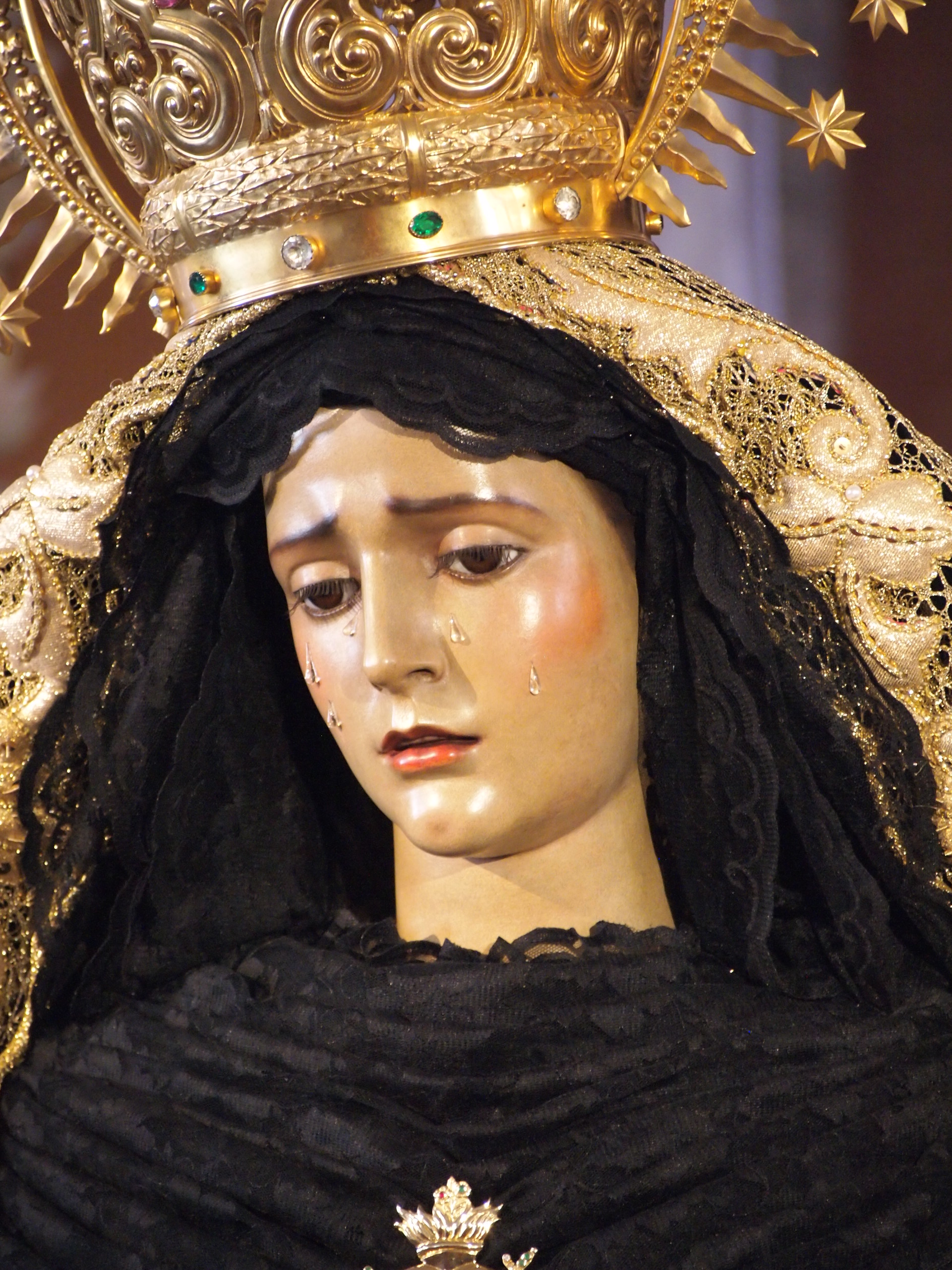 Imagen de Nuestra Señora del Dolor de Hellín